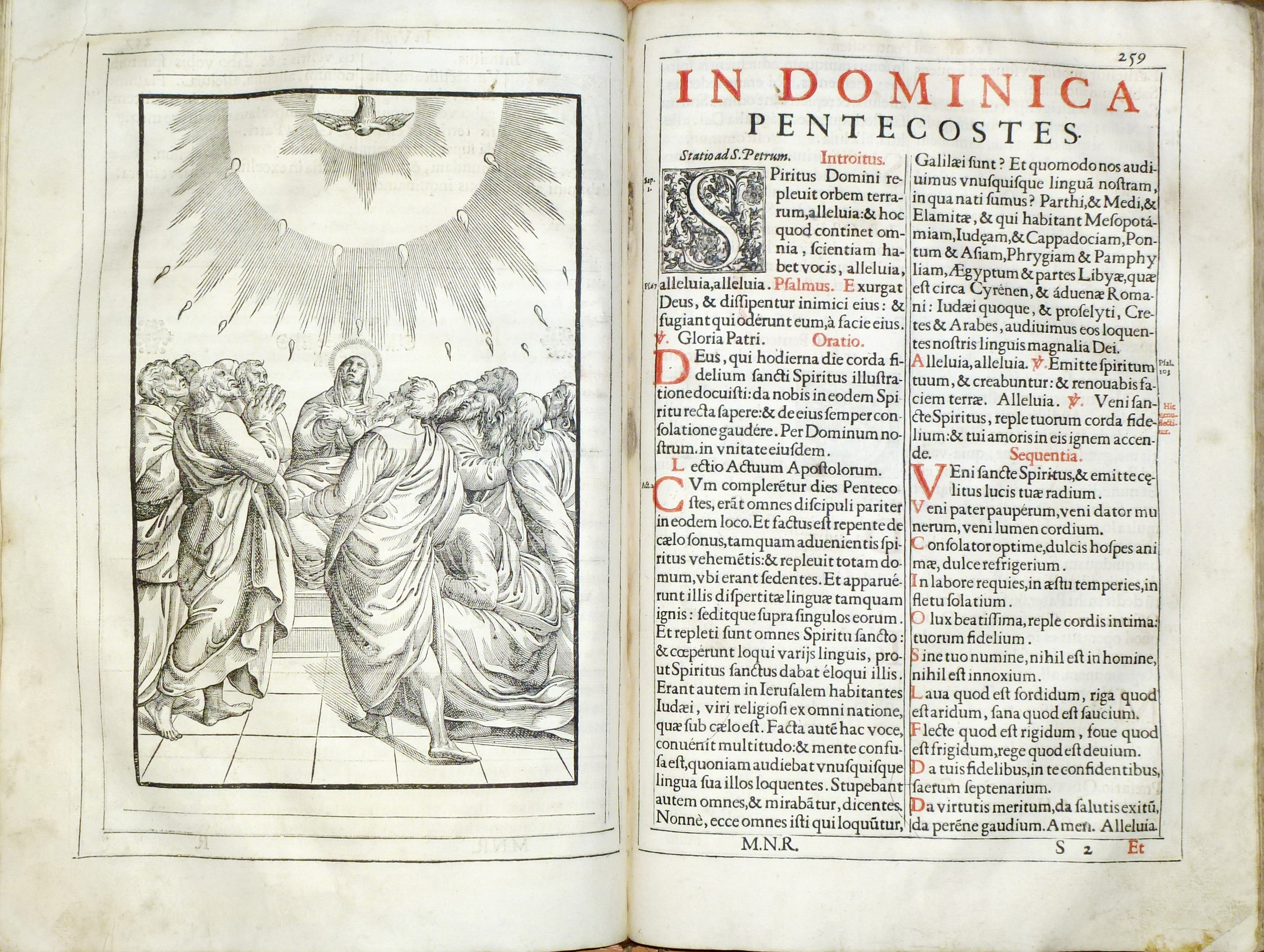 Гравюра з зображенням зішестя Св. Духа та початком меси в неділю П'ятидесятниці. P. 258-259 видання: Missale Romanum. - Venetiis: Apud Iuntas, 1632. - [34], 503, [1], LXXXVII, [5], 8 p. 2°.